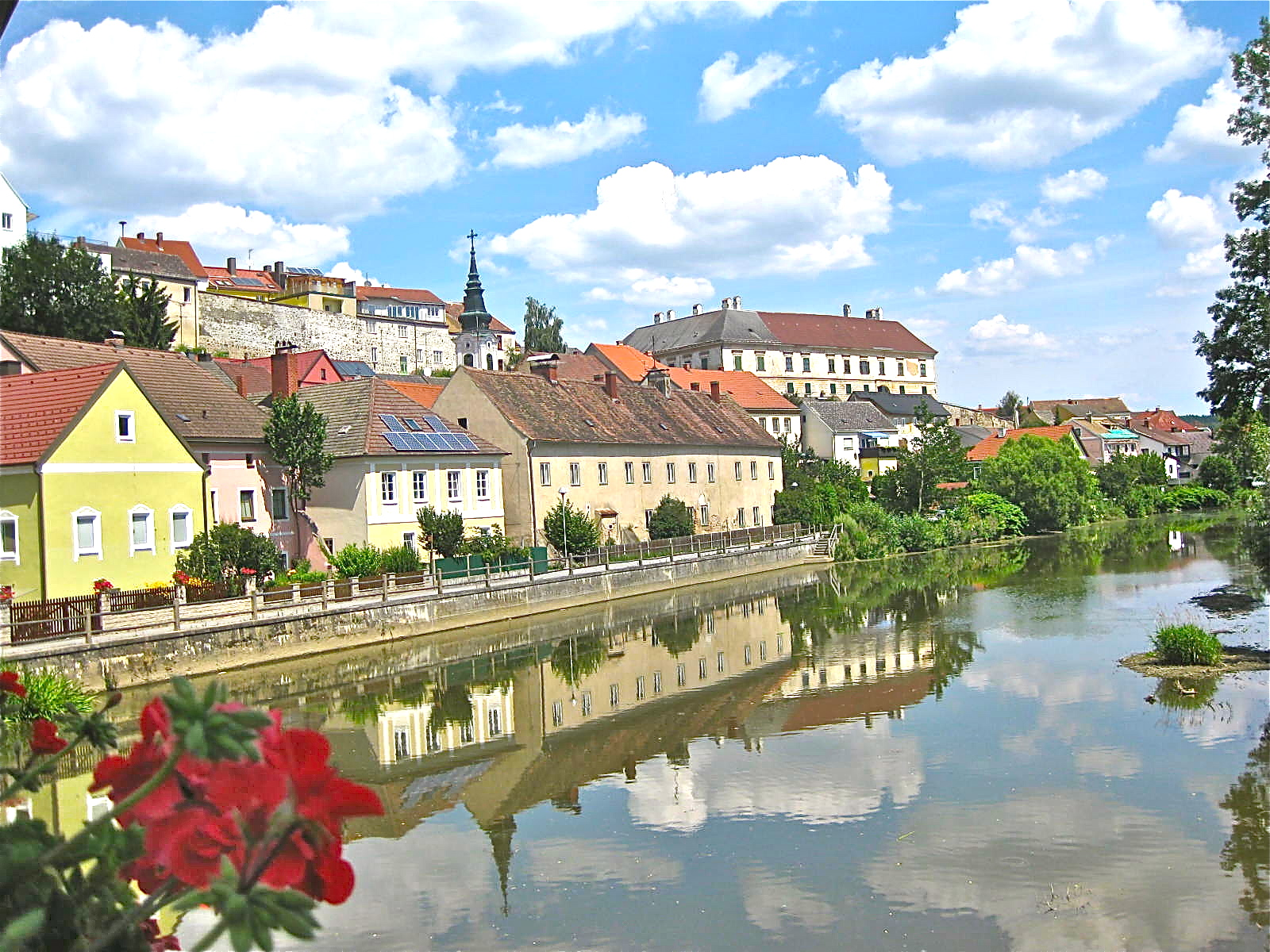 Schloss Waidhofen from bridge over river Thaya - showing Stadtmauer